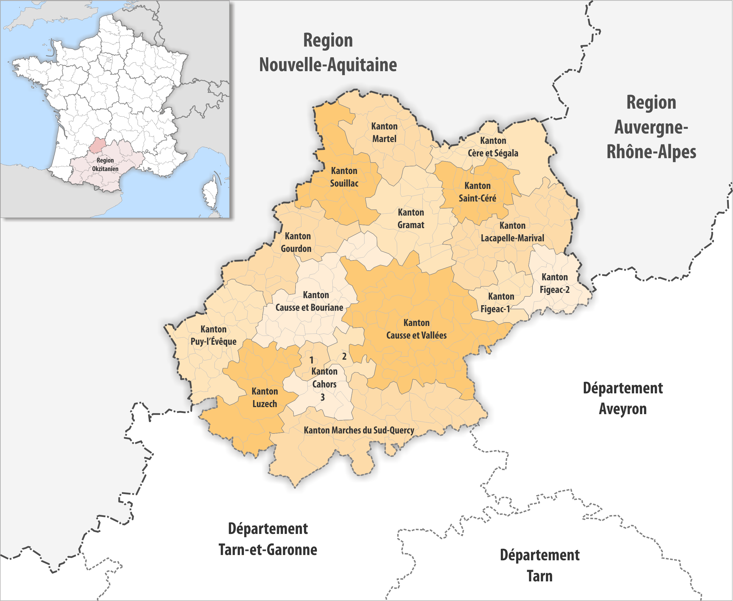 Gemeinden und Kantone im Departement Lot